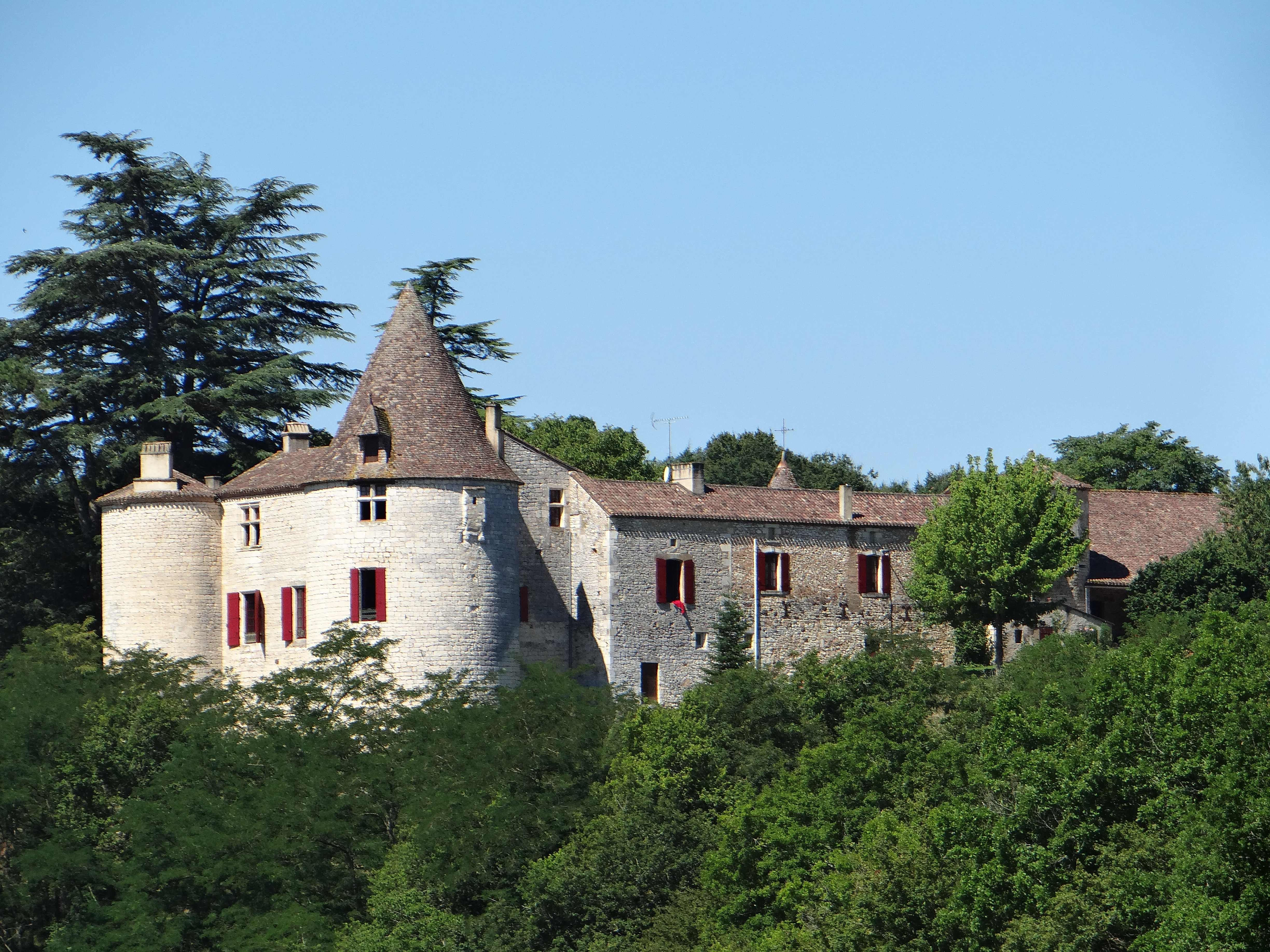 Gaugeac - Château de Saint-Germain